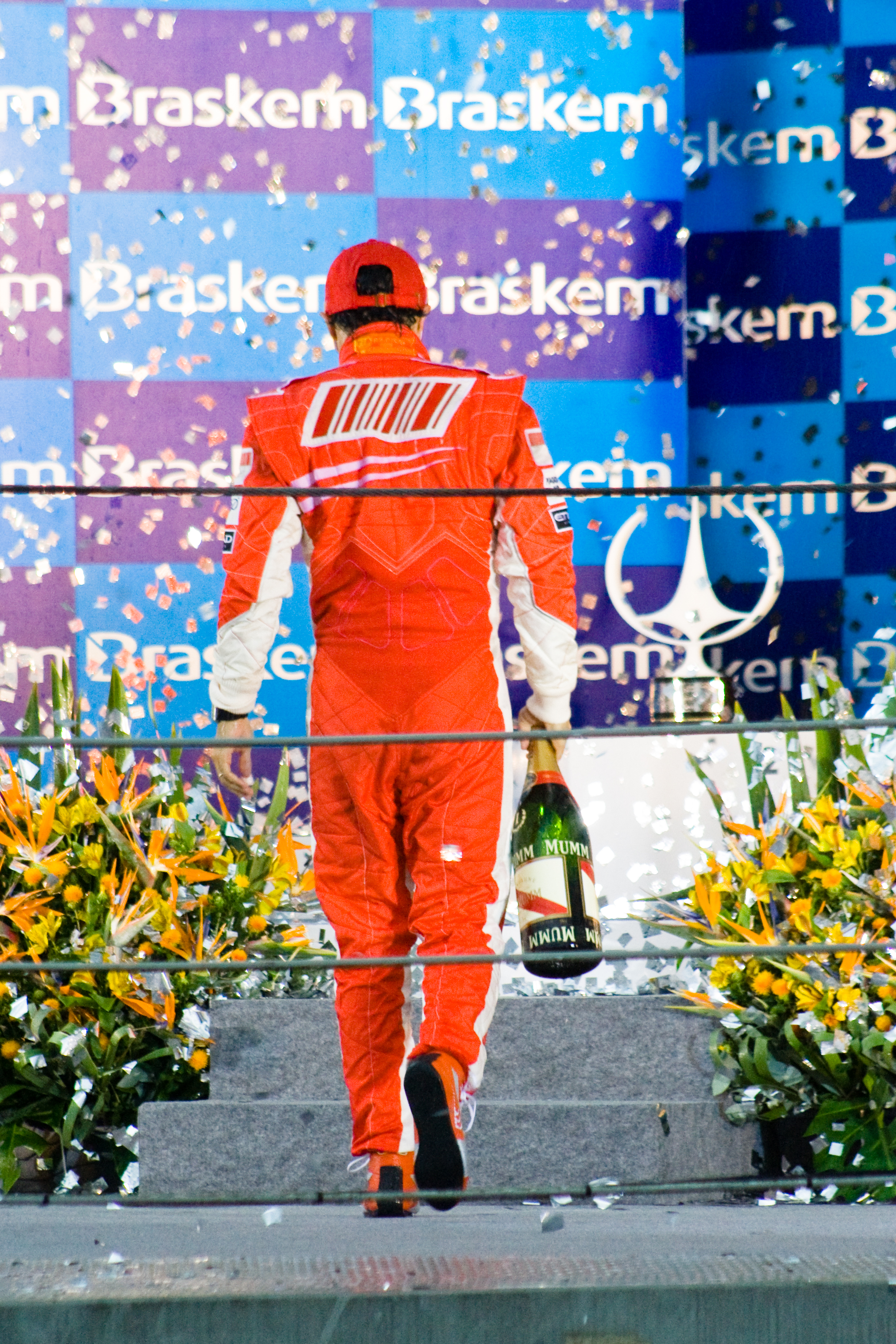 Felipe Massa / F1 / Brazilian GP Winner